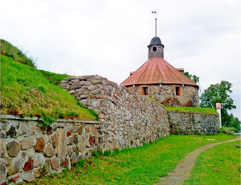 Комплекс крепостных сооружений (Лен.область, Приозерск, Ленинградское ш., 1, 3)